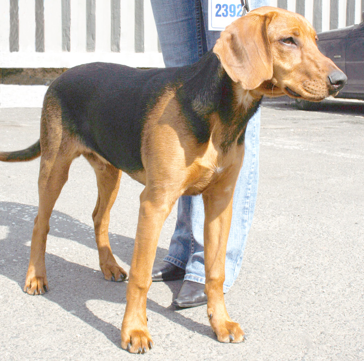 Schillerstövare